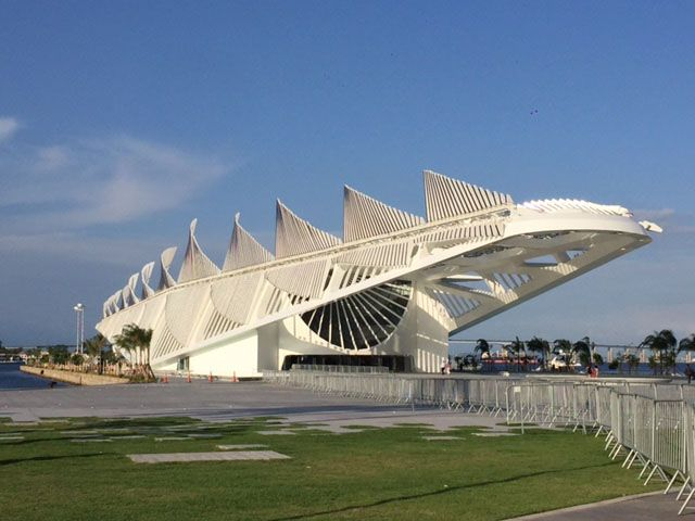 Museu do Amanhã, Rio de Janeiro, Brasil, inaugurado em dezembro de 2015.